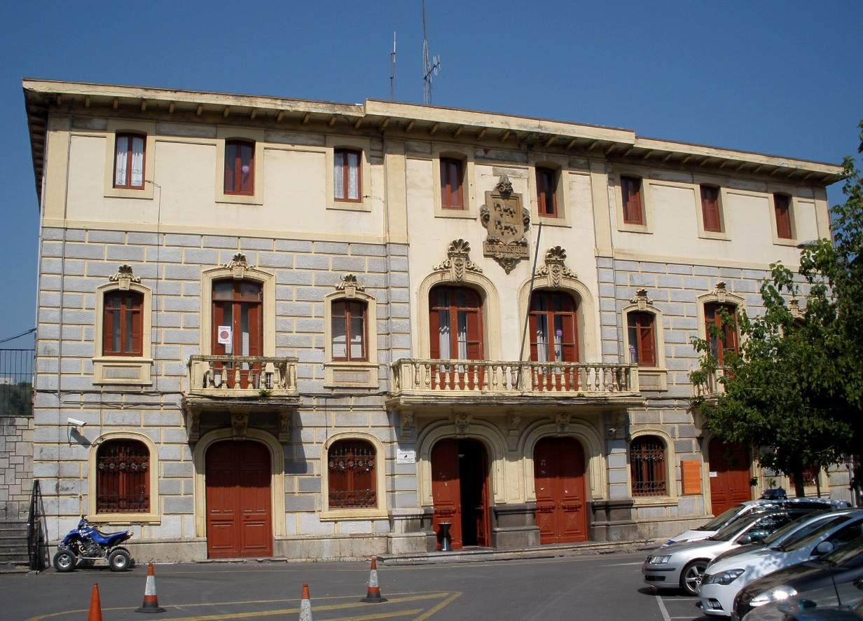 Ayuntamiento de Ortuella (Bizkaia)